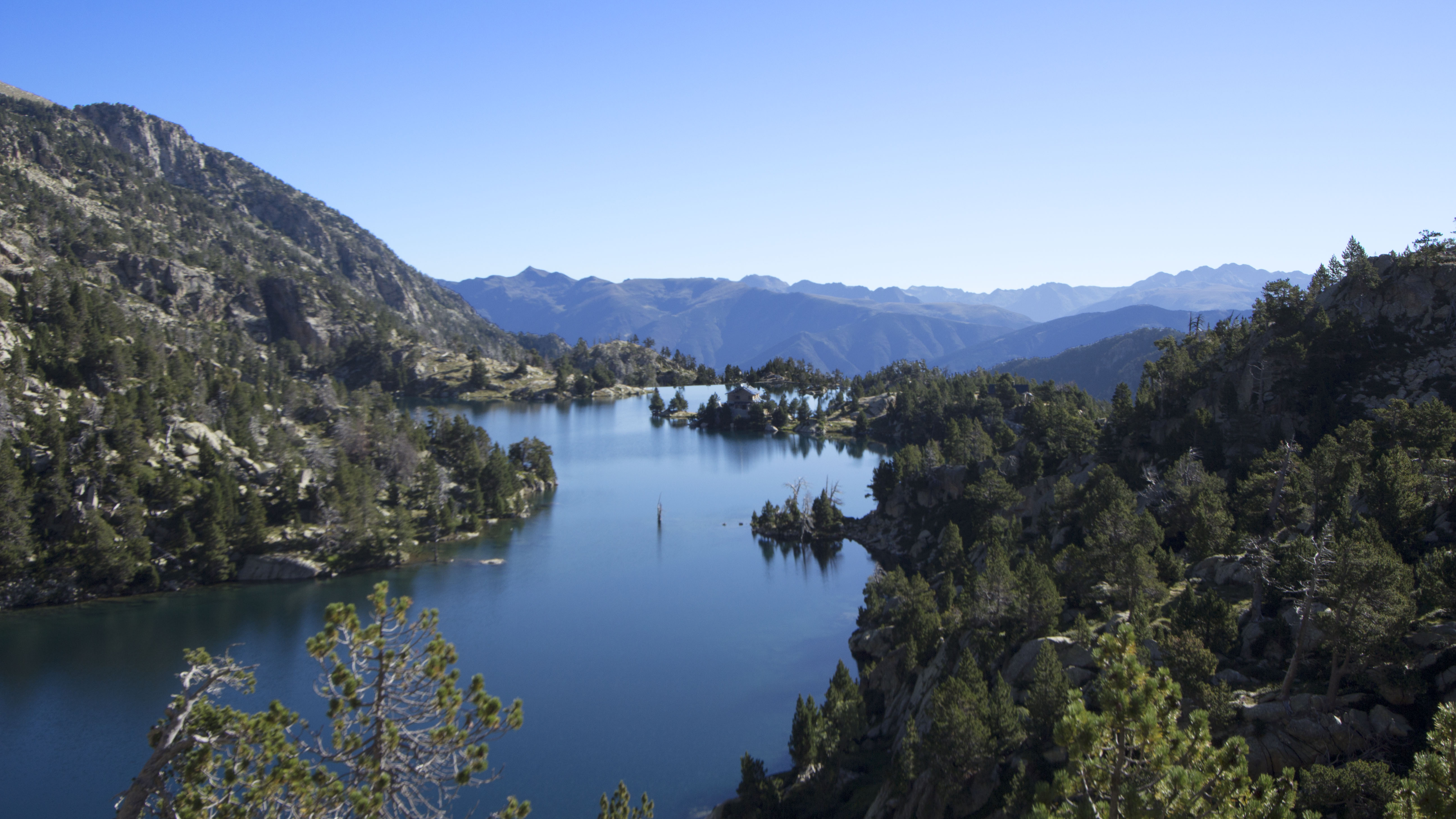 Estany Tort de Peguera i refugi Josep Maria Blanc (Pallars Sobirà)